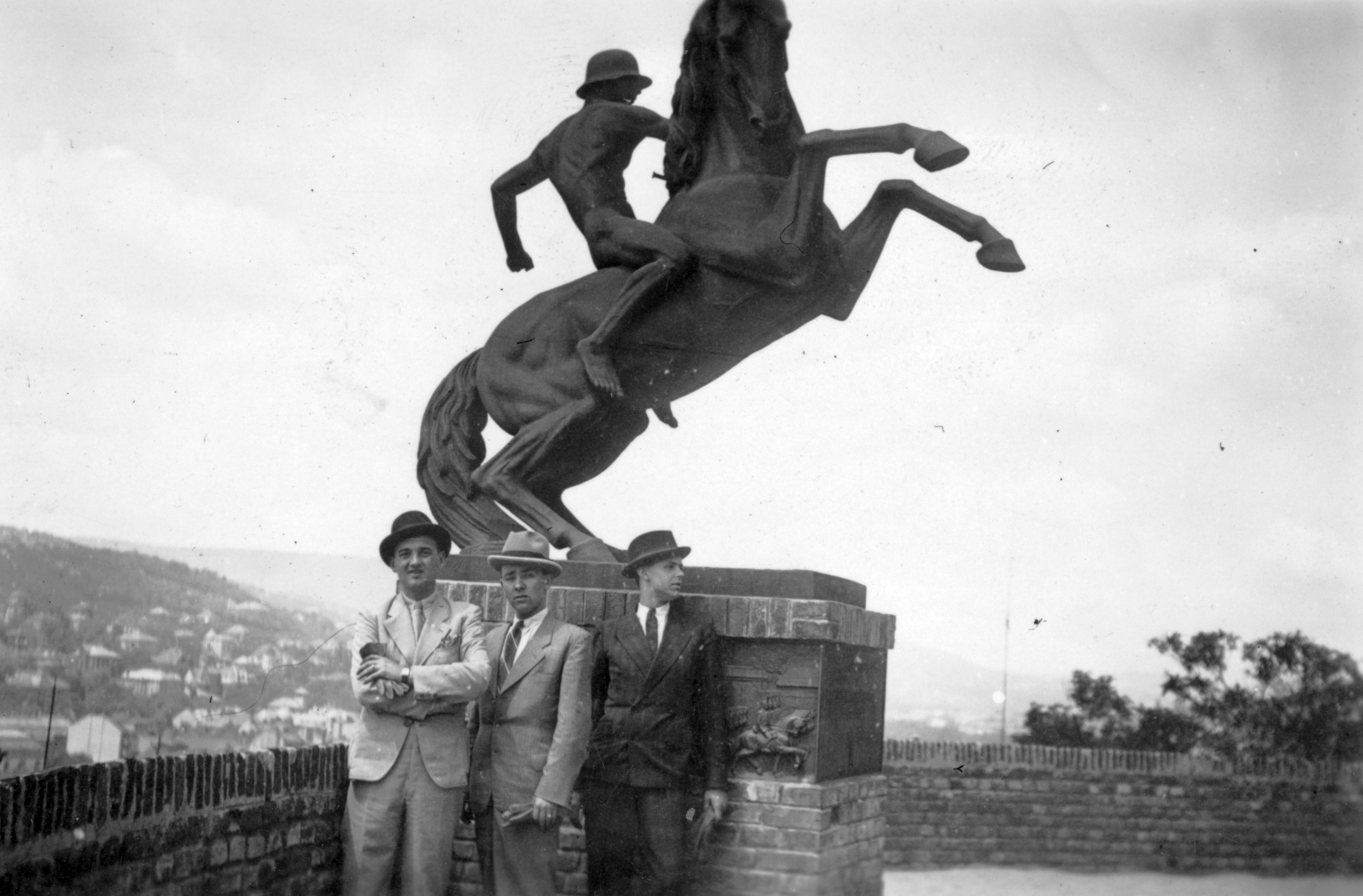 Tóth Árpád (Bethlen István) sétány, Veli bej rondella, az erdélyi kettes huszárok emlékére állított lovasszobor. Location: Hungary, Budapest I. Tags: horse sculpture, tableau, men, hat, Budapest Title: Tóth Árpád (Bethlen István) sétány, Veli bej rondella, az erdélyi kettes huszárok emlékére állított lovasszobor.